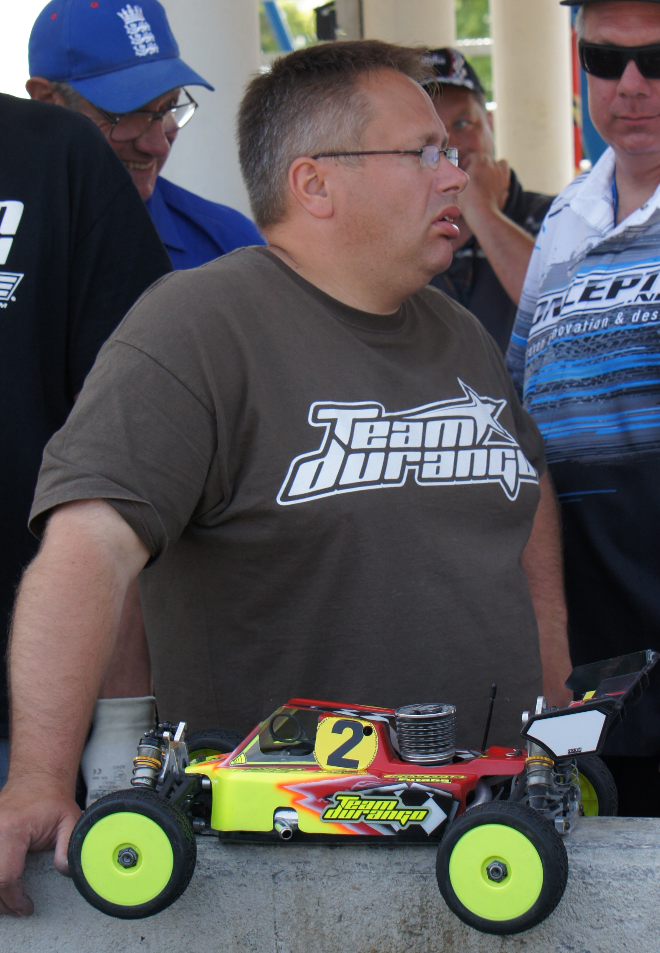 Lors du championnat d'Europe EFRA 2013 à Reims.